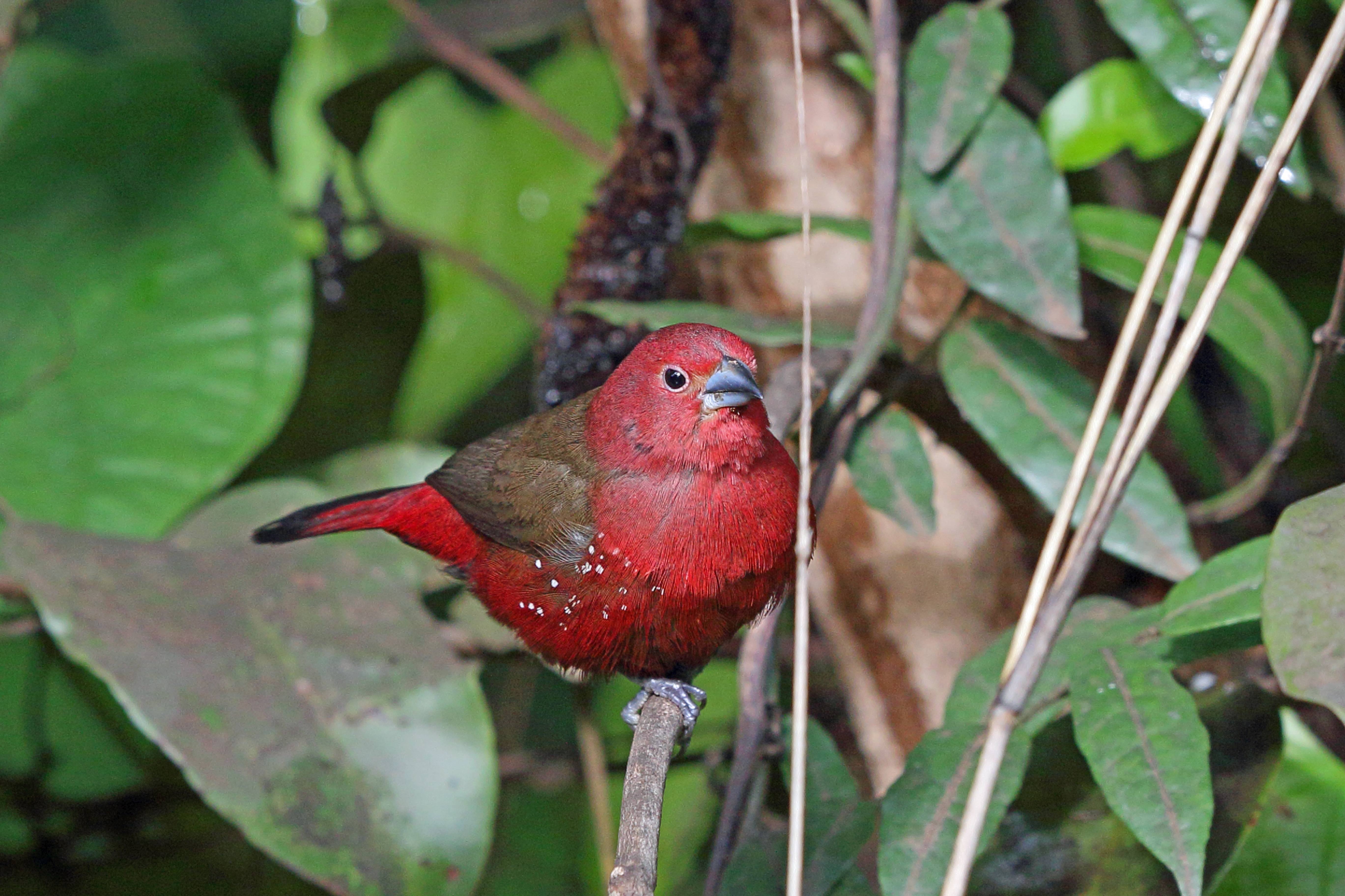 Adult male